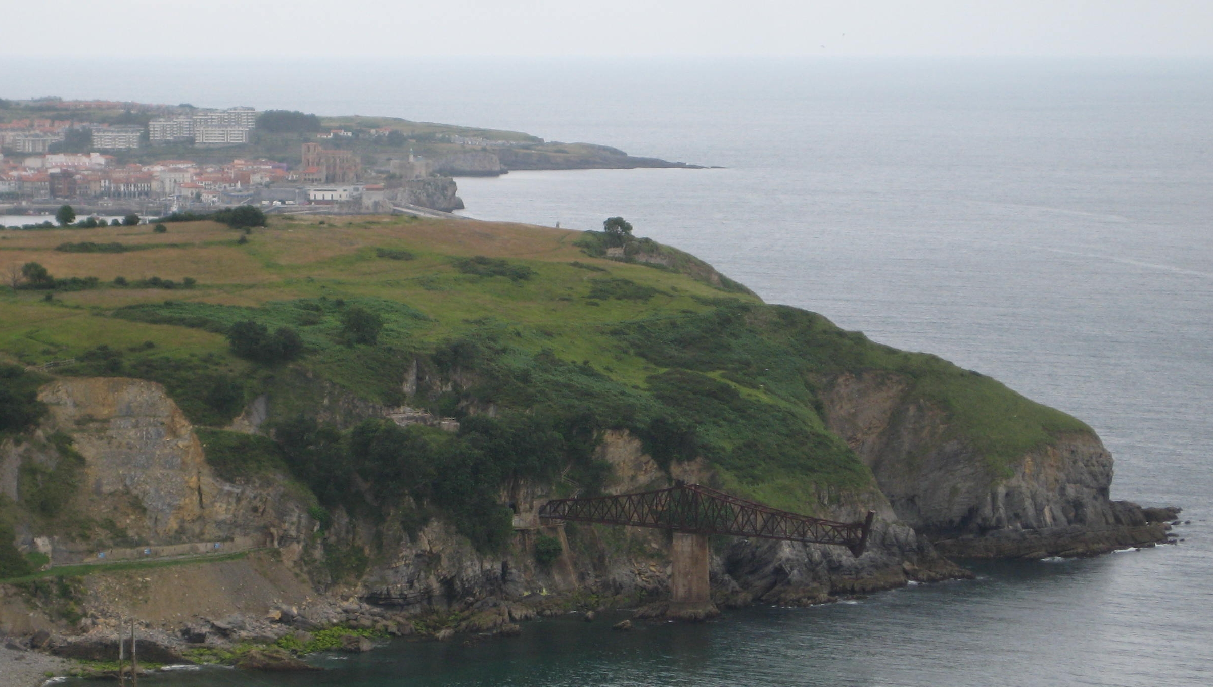 Ensenada de Dícido con cargadero de mineral, al nordeste de Mioño. Detrás de El Cueto, el puerto de Castro Urdiales.